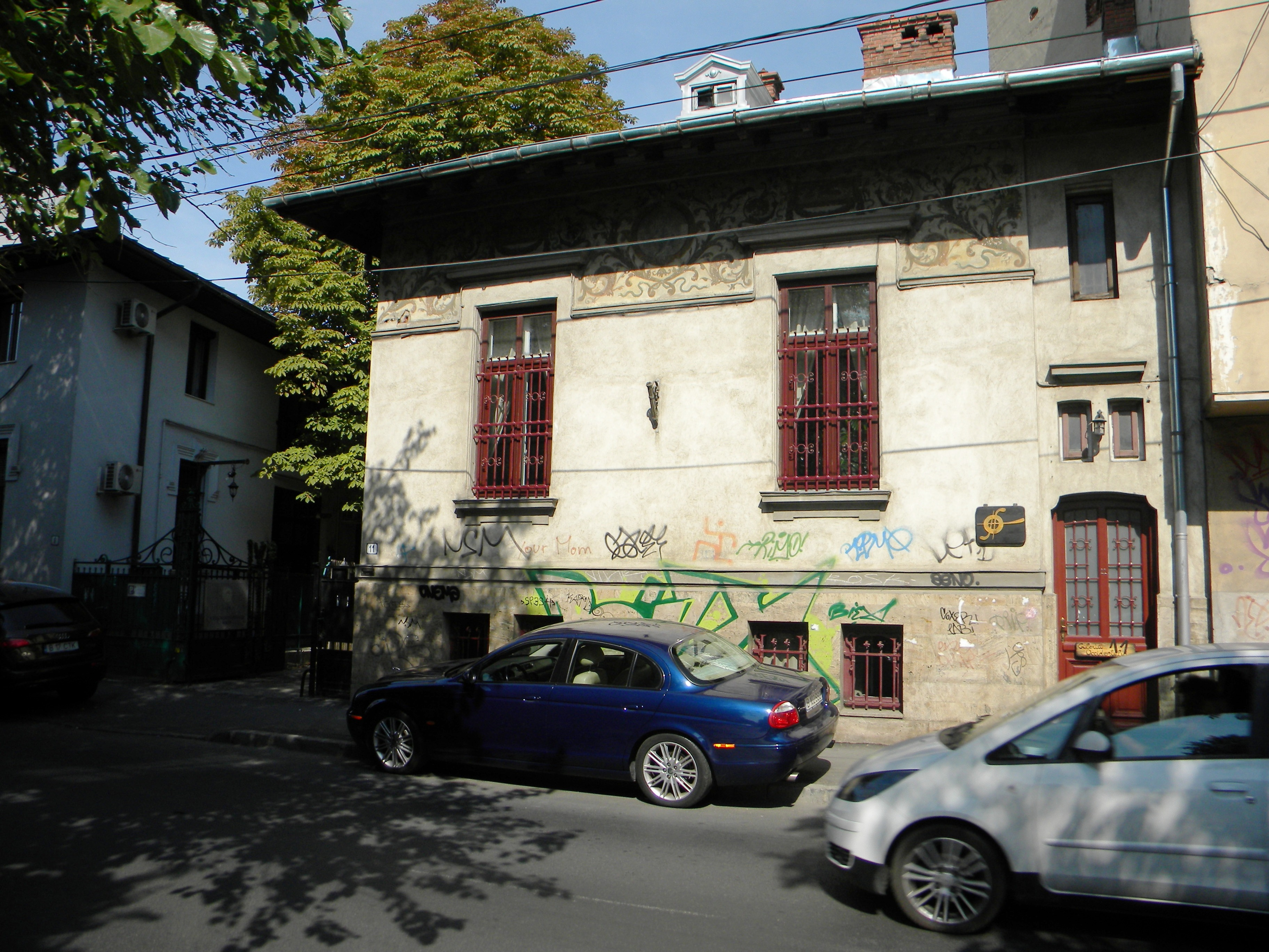 Bucuresti, Romania, Casa cu pictura exterioara, pe Str. Occidentului nr. 11, sect. 1